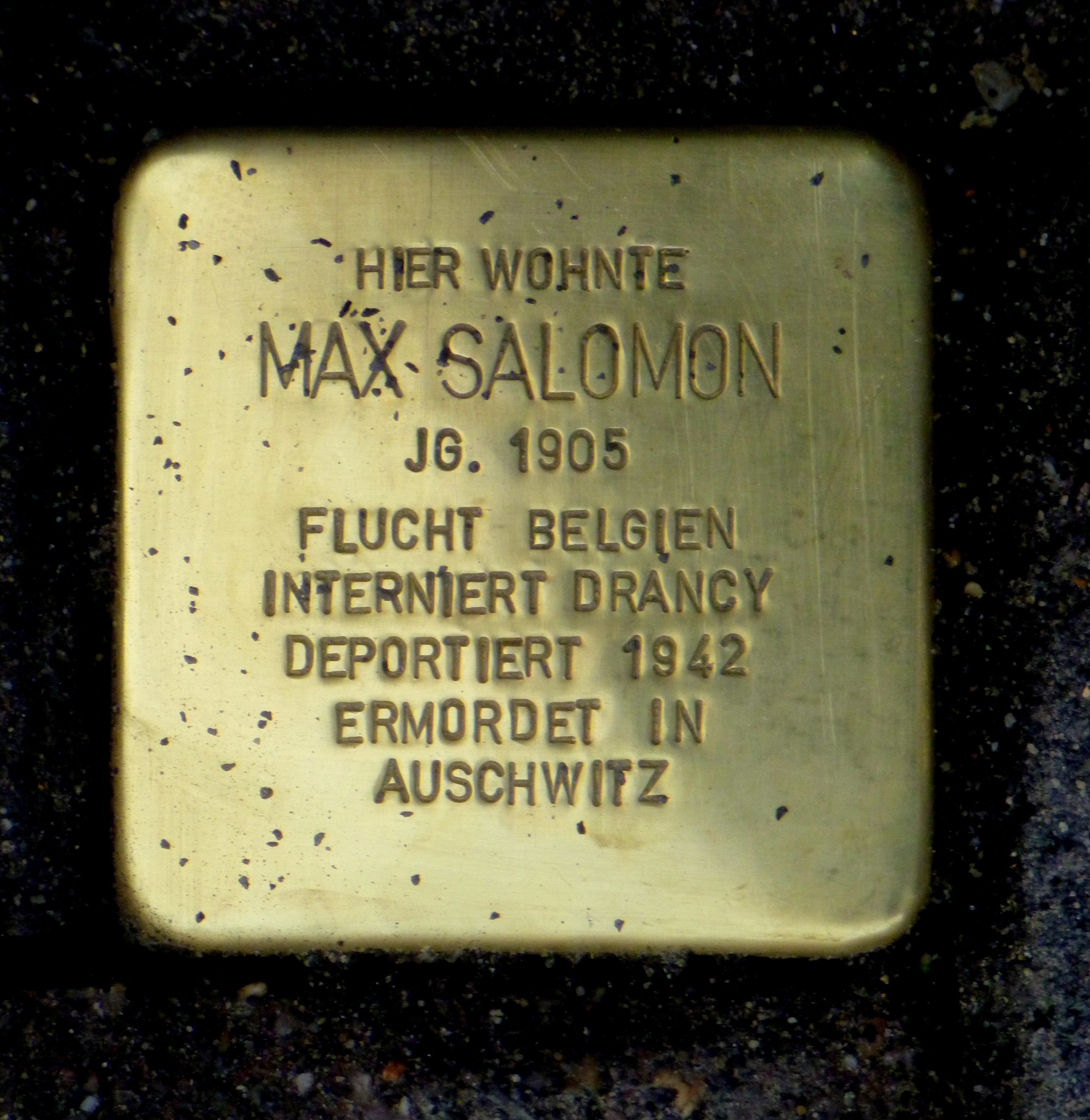 Stolperstein für Max Salomon in Aachen, Thomashofstraße 15